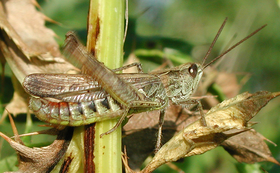 Chorthippus biguttulus, stridulating male, NSG Kirchwerder Wiesen, Elbmarsch bei Hamburg, Germany